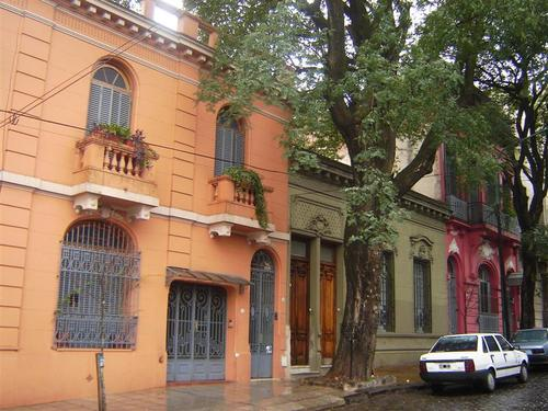 Barrio de San Cristóbal, Ciudad de Buenos Aires, Argentina.